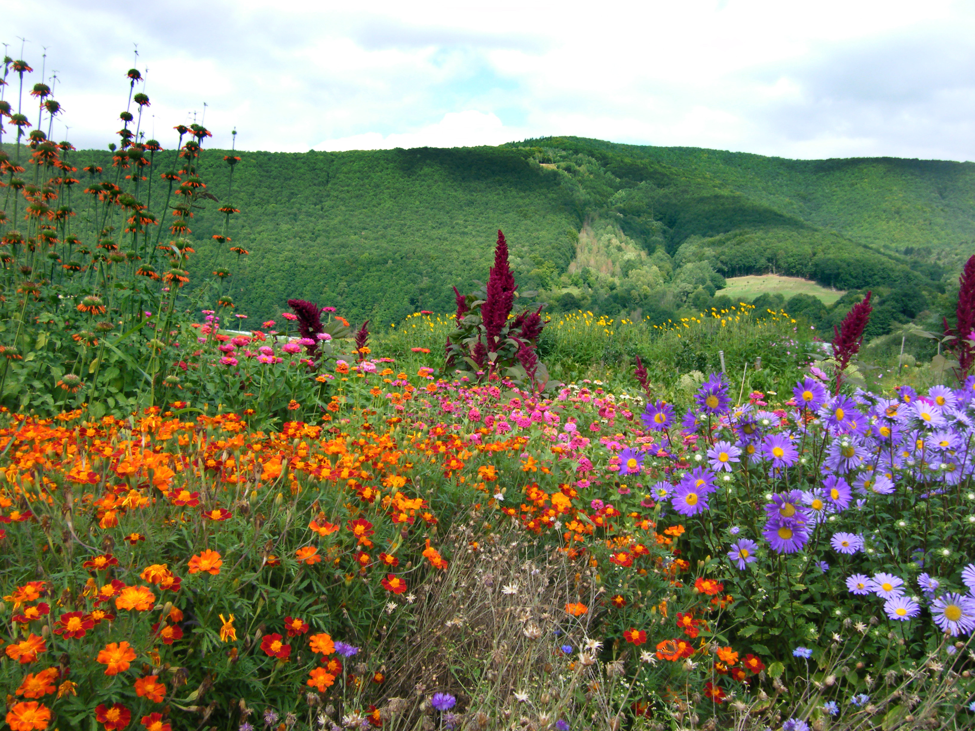 Blick von Lindewerra auf Naturschutzgebiet Harthberg, WDPA ID 163534 (links) und NSG Kelle-Teufelskanzel, WDPA ID 164048 (rechts). Höchste Erhebung ist die Junkerkuppe, der Streifen im Waldgebiet ist ein Relikt der ehemaligen innerdeutschen Grenze.